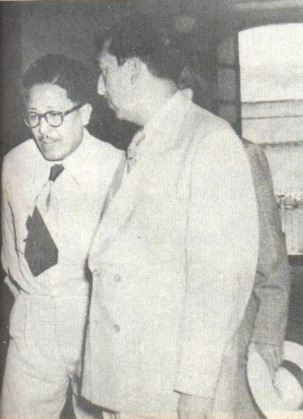 El gobernador del estado mexicano de Guerrero (1951-1954) Alejandro Gómez Maganda (izquierda) y el presidente de México (1946-1952) Miguel Alemán Valdés (derecha) en una visita oficial de éste último a dicha entidad en el sur de México.